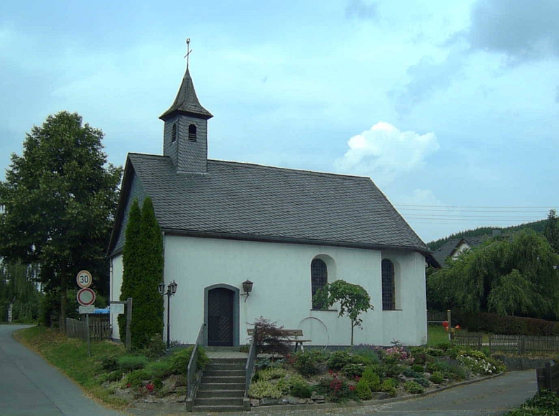 Kapelle in Mailar (Schmallenberg), Germany.